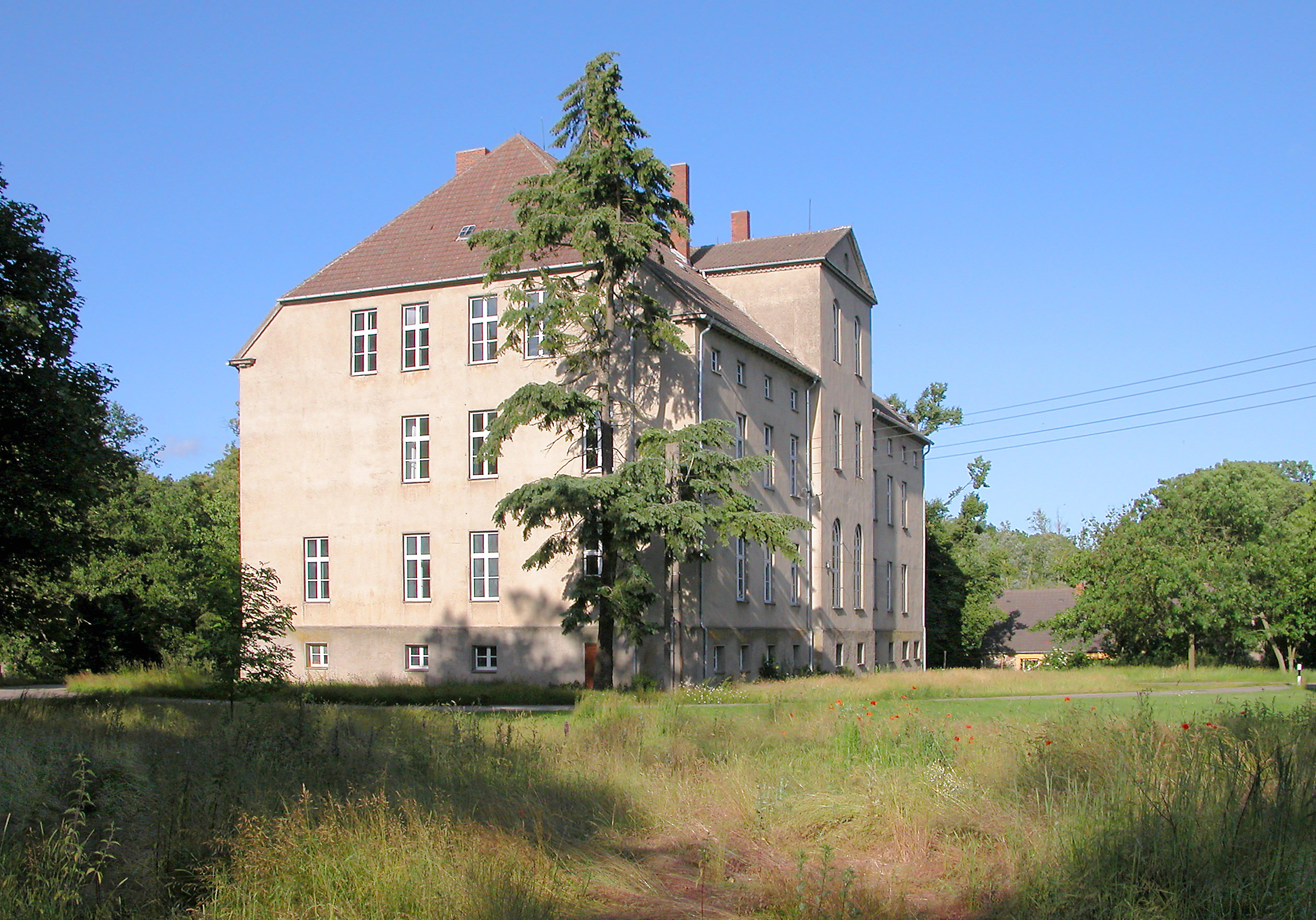 28.06.2004 17129 Alt Plestlin (Bentzin): Herrenhaus Alt Plestlin 8A (GMP: 53.958516,13.228504), erbaut Mitte des 19. Jahrhunderts. [DSCN4457.JPG]20040628710DR.JPG(c)Blobelt)